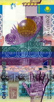 10,000 Kazakhstani tenge (2006 new design)